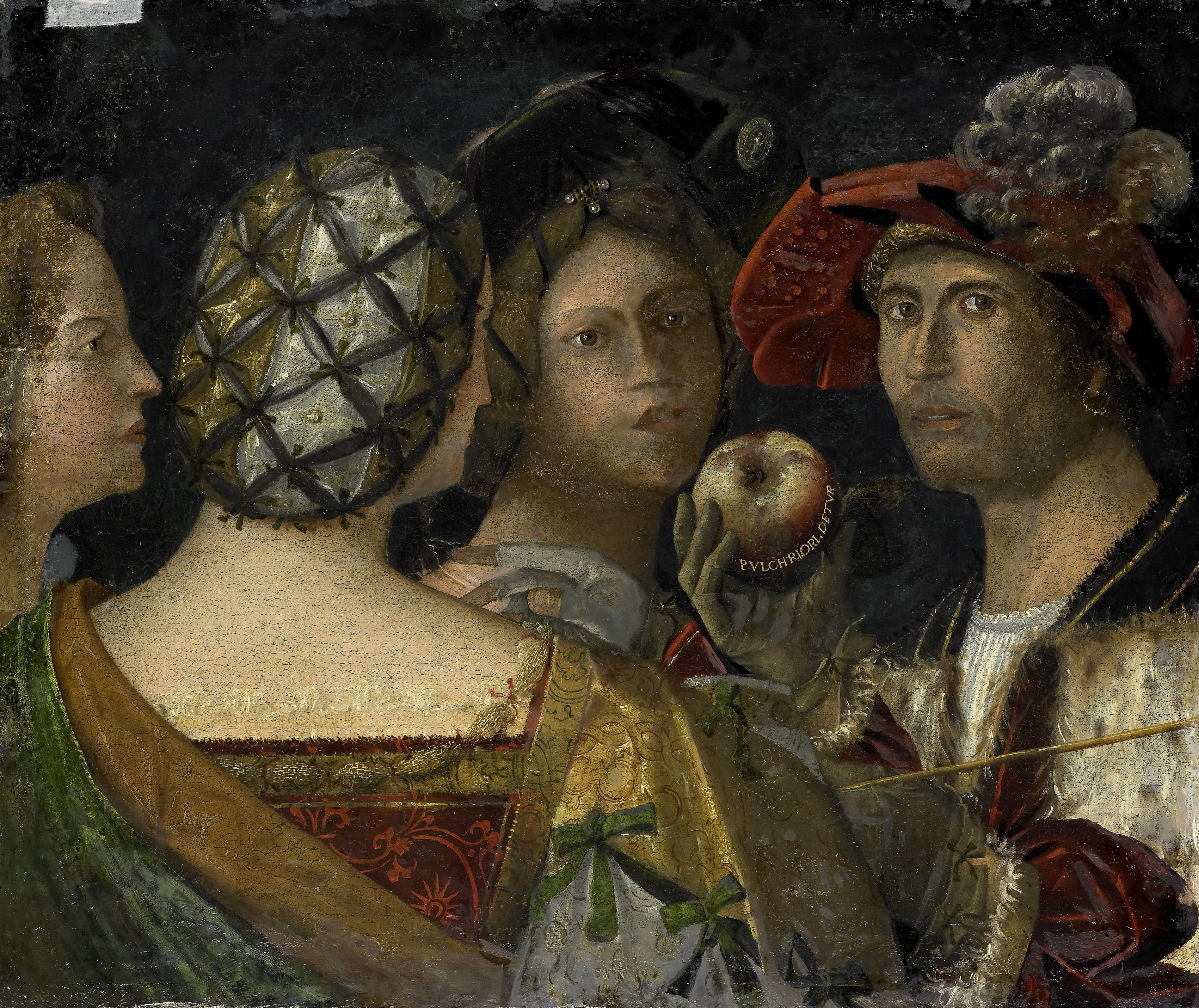 Het oordeel van Paris. Rechts de herder Paris met een appel in de hand, links de drie godinnen Hera, Athena en Aphrodite.